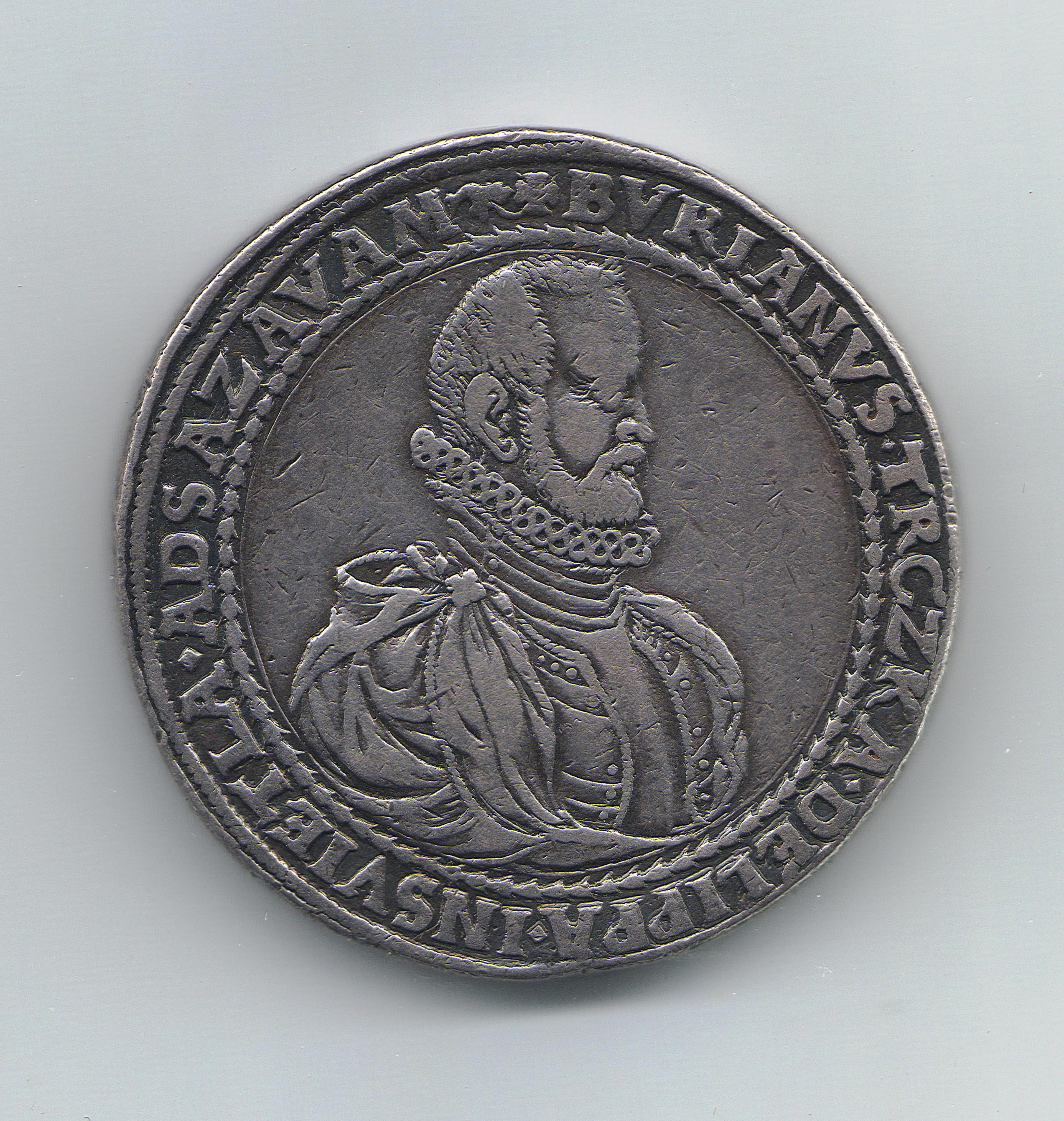 medaile Buriána Trčky z Lípy 1588 avers